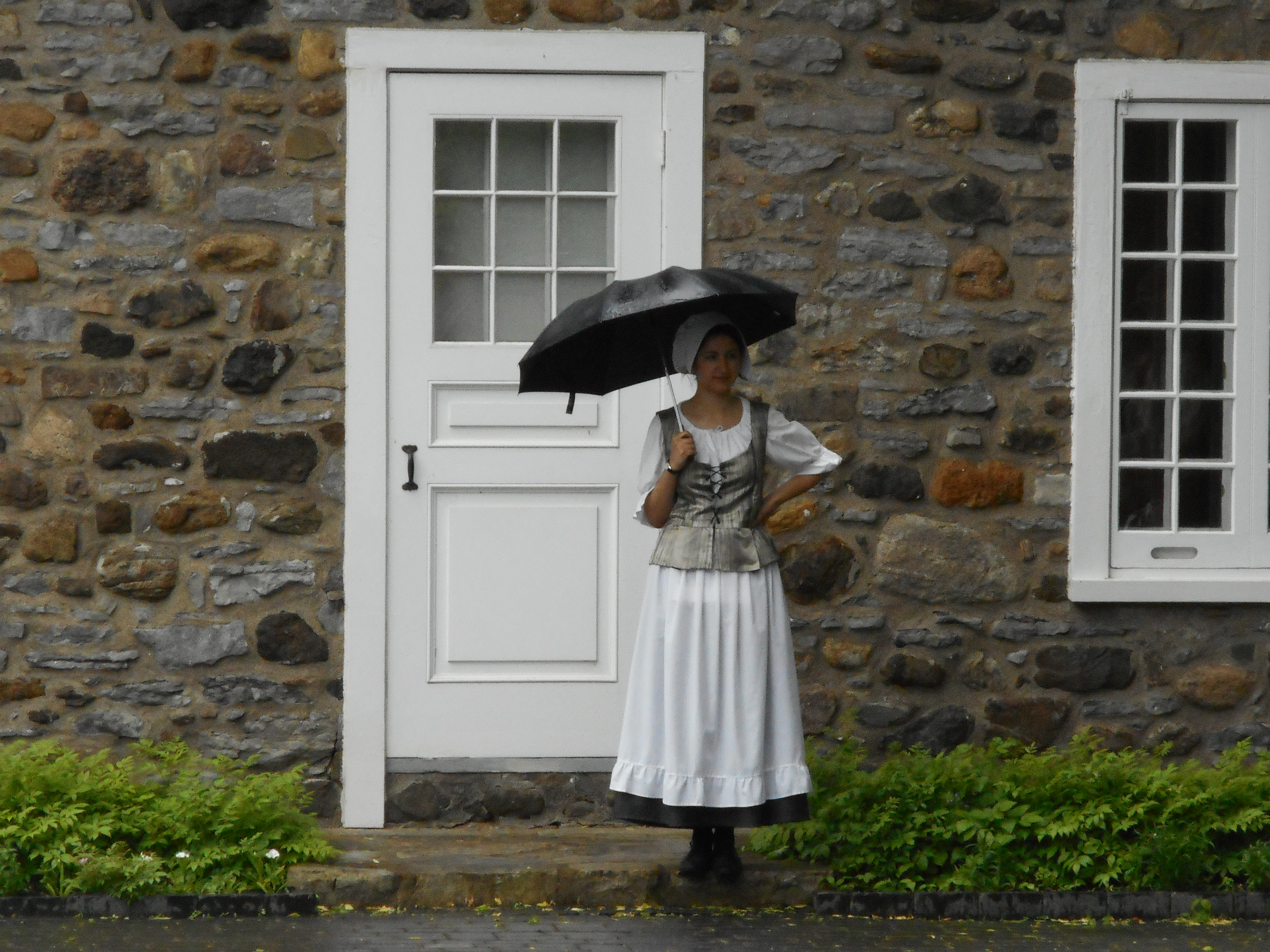 Guide habillée à la manière de l'époque de la Nouvelle-France Maison Saint-Gabriel, musée et site historique, 2146, place Dublin, Pointe-Saint-Charles, Montréal